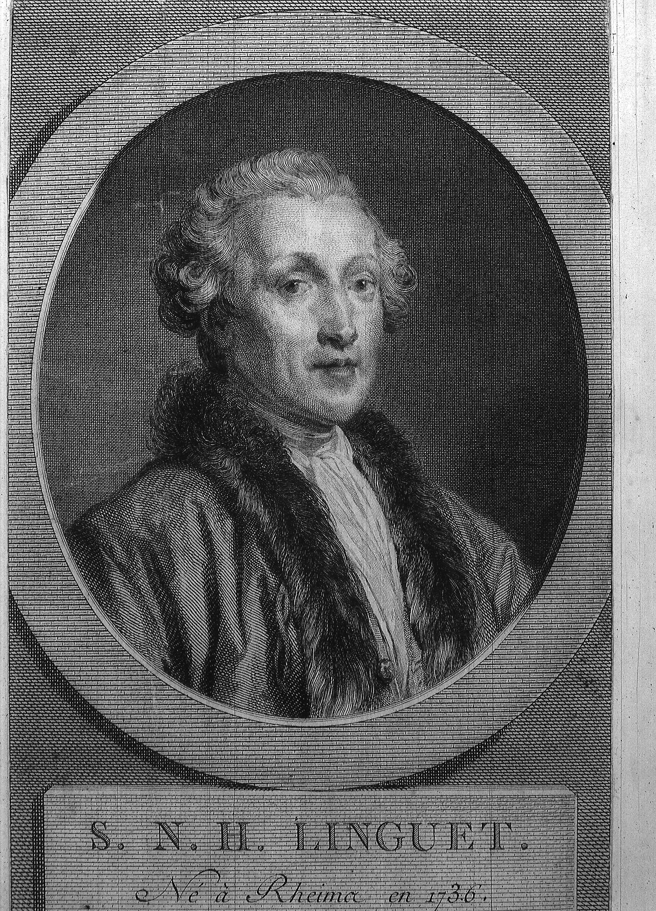 image issue de la bibliothèque de reims.